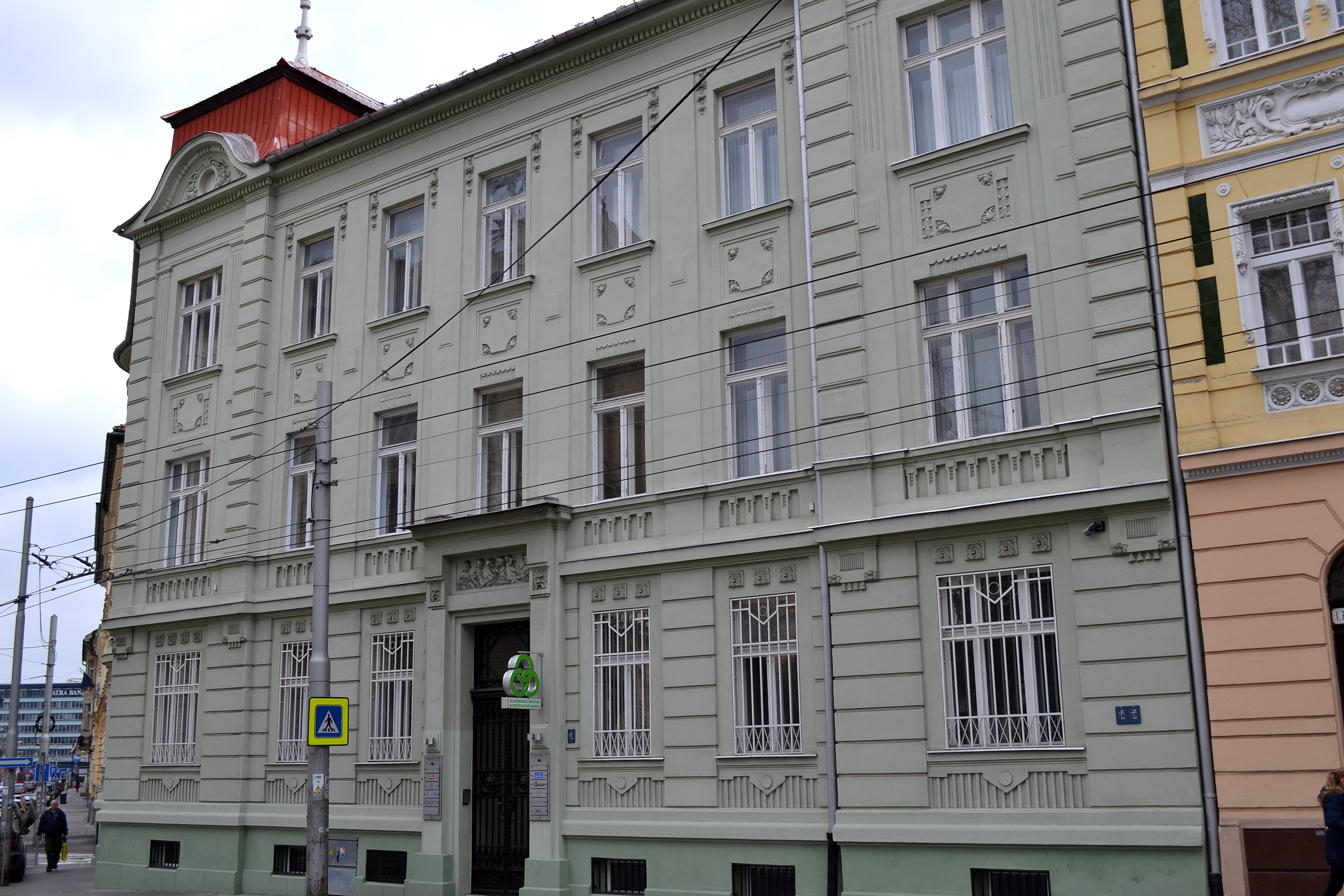 Palisády č. 36